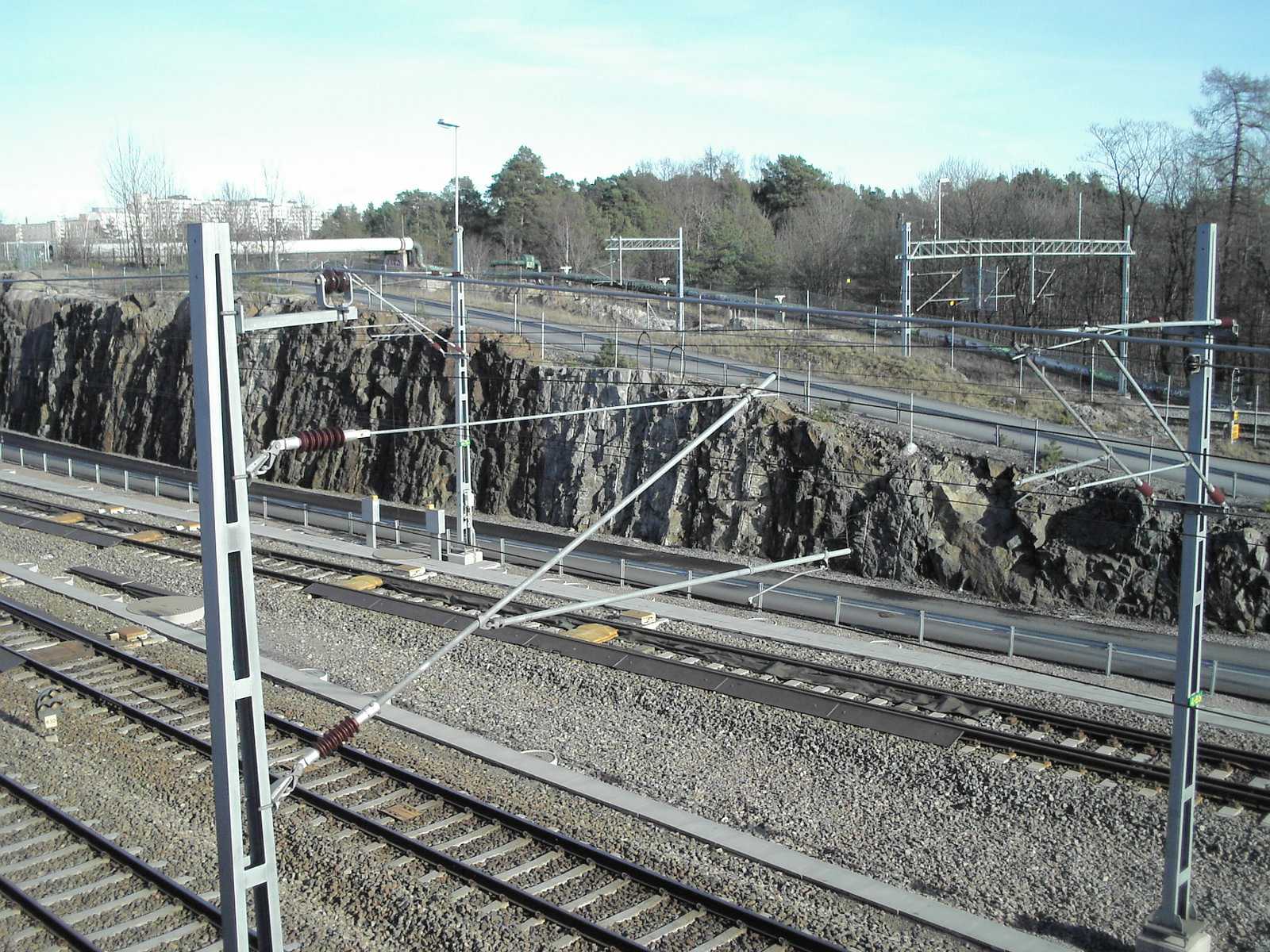 Utliggare